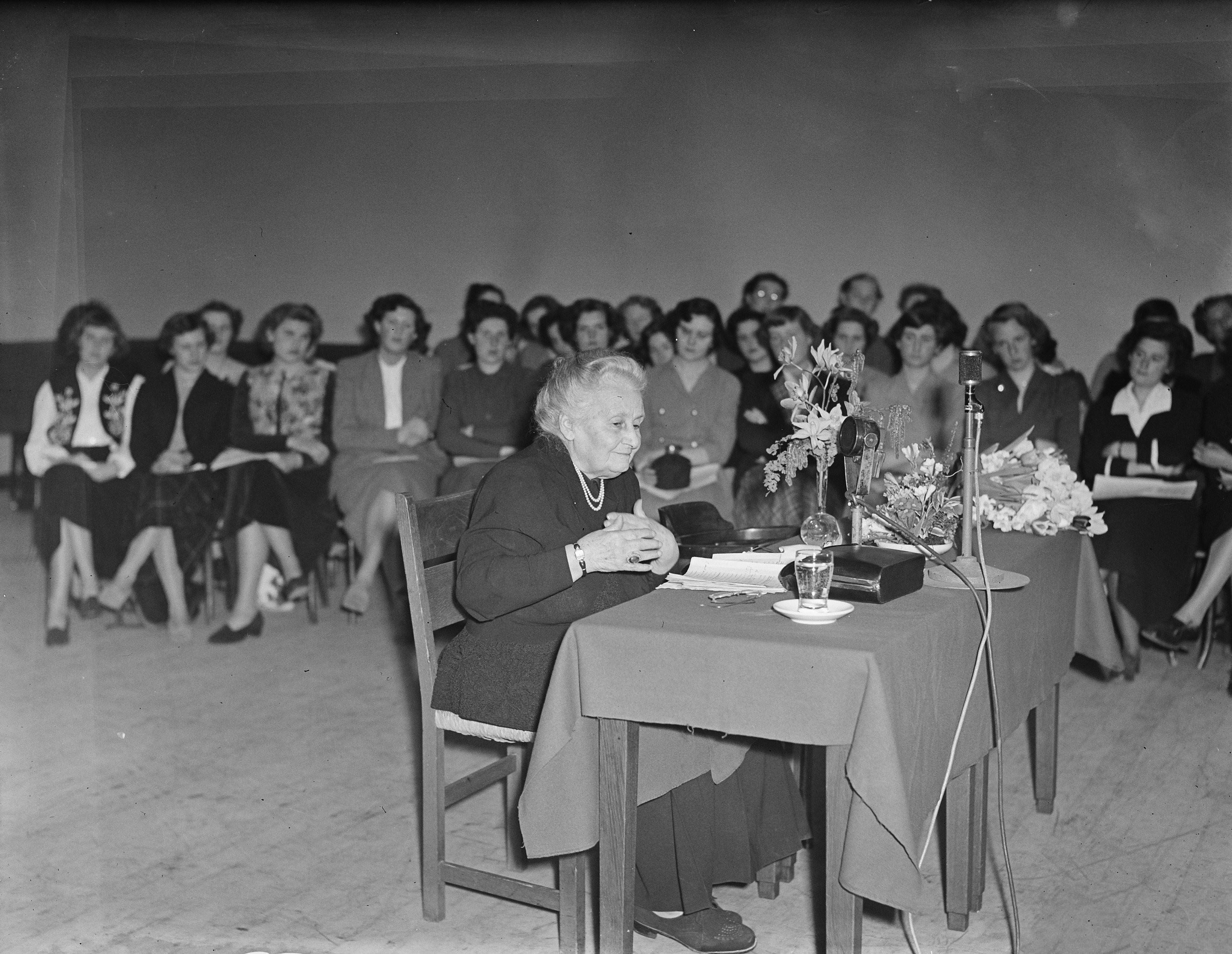 Collectie / Archief : Fotocollectie Anefo Reportage / Serie : [ onbekend ] Beschrijving : Maria Montessori in Amsterdam Datum : 1 maart 1950 Locatie : Amsterdam, Noord-Holland Trefwoorden : onderwijs, pedagogen Persoonsnaam : Montessori, Maria Fotograaf : Nijs, Jac. de / Anefo Auteursrechthebbende : Nationaal Archief Materiaalsoort : Glasnegatief Nummer archiefinventaris : bekijk toegang 2.24.01.09 Bestanddeelnummer : 903-8465